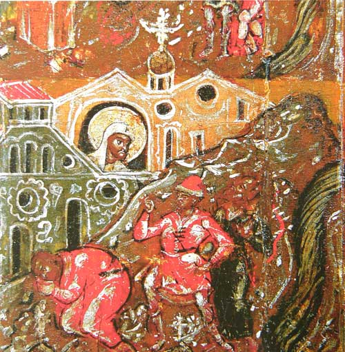 Язычники-ростовчане идут убивать св. Леонтия. Клеймо иконы «Леонтий Ростовский с житием в 24 клеймах». Ок. 1677 г. 100×78 см. Муромский историко-художественный музей, Муром, Россия. Инв. М-6674.